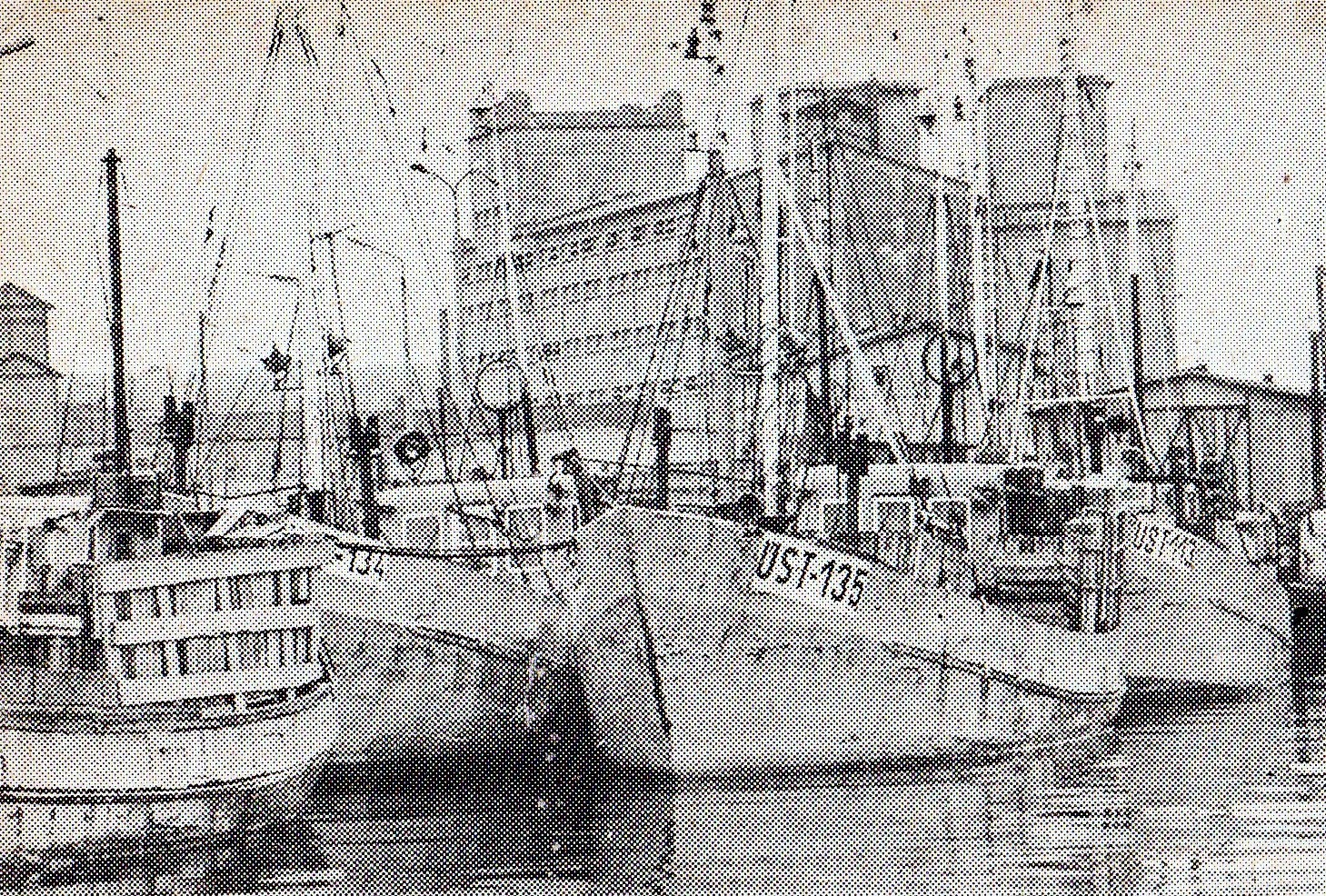 Port w Ustce w 1979r.